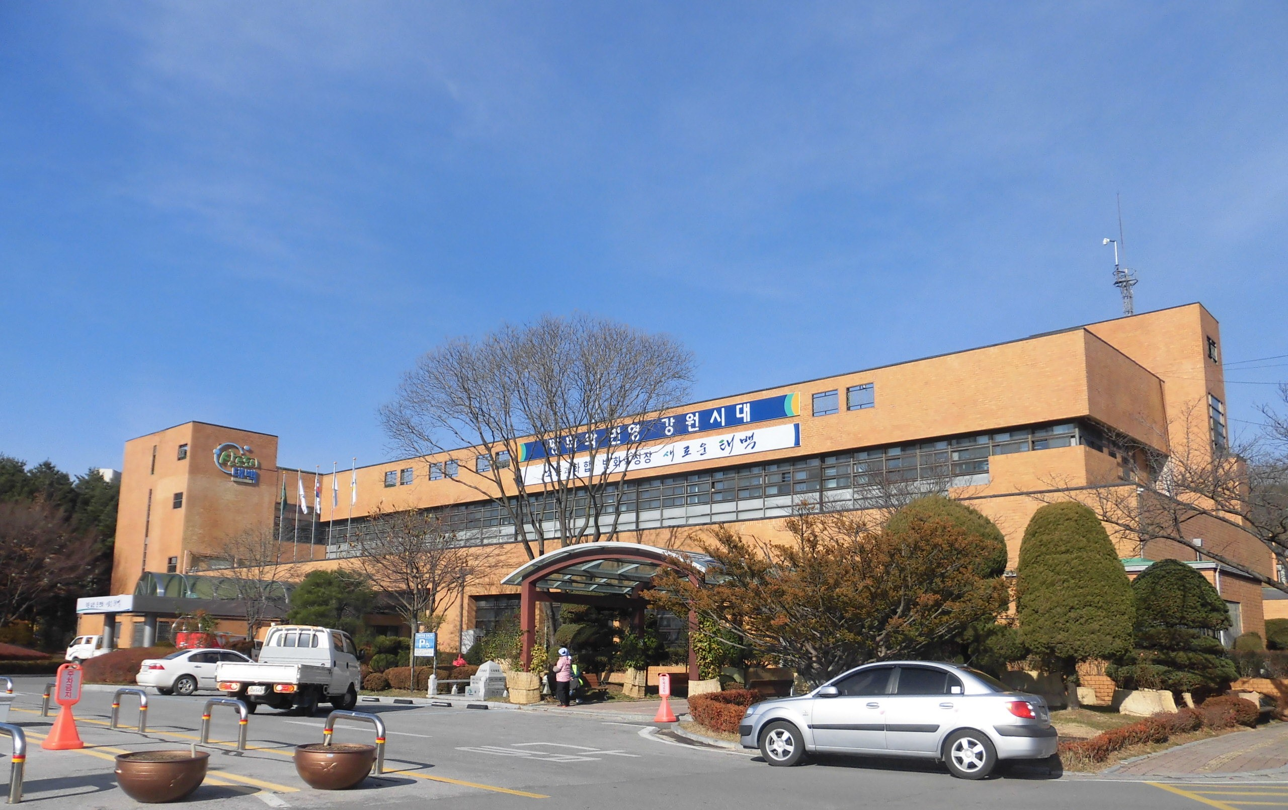 강원도 태백시에 있는 태백시청